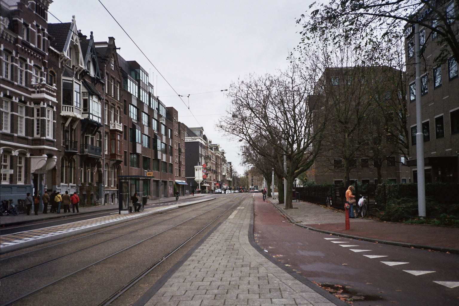 Weteringschans,Amsterdam, rechts kantoren Peper en Zout, links midden het pand van Carl Denig, uitzicht op brug 90